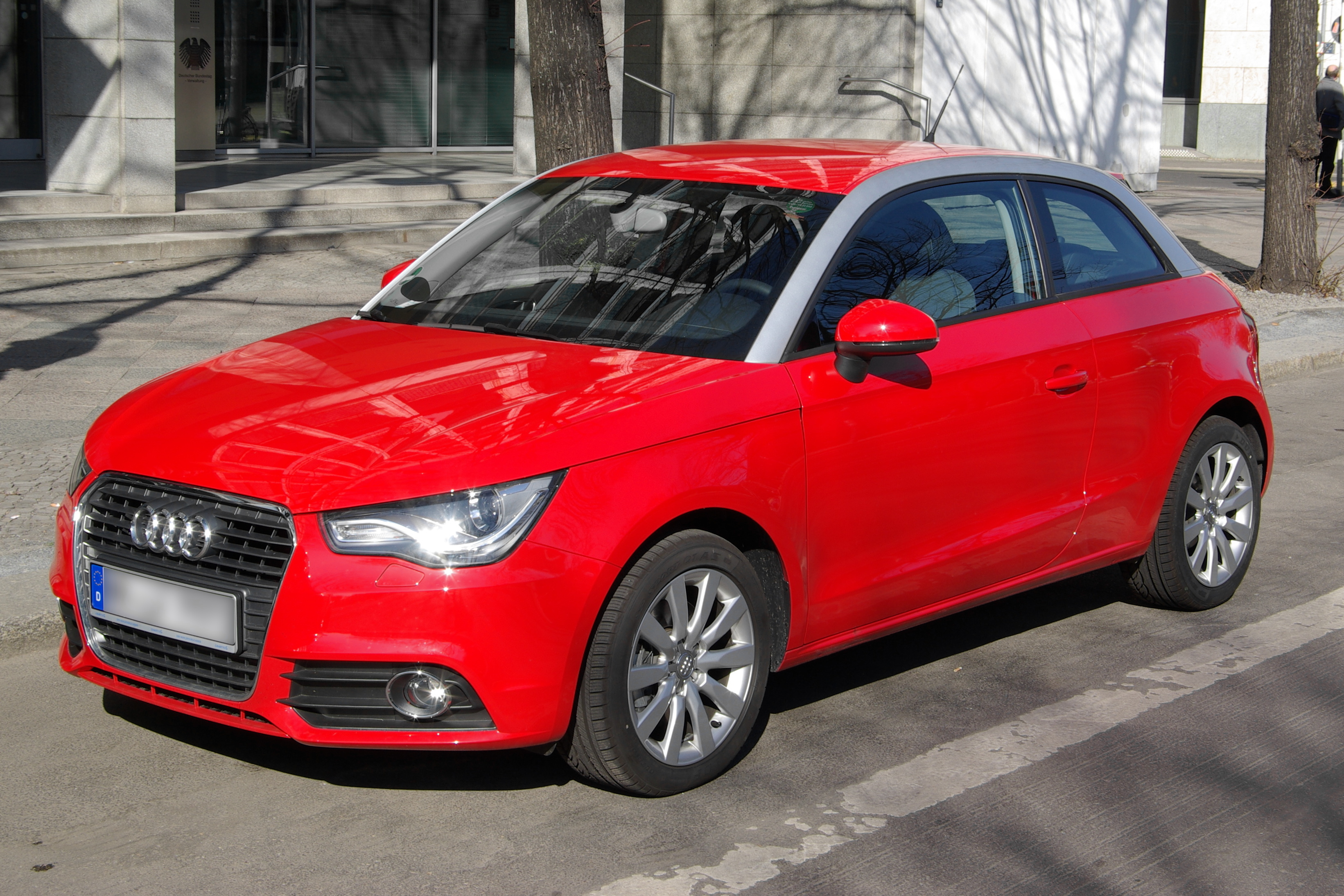 Audi A1